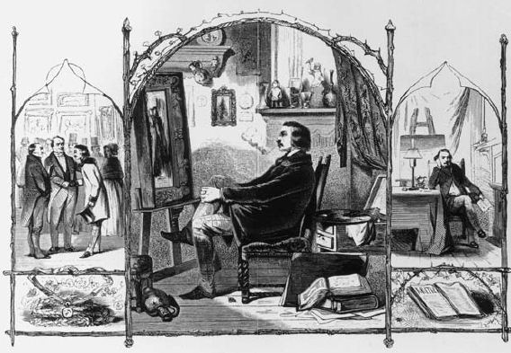 Des schilders mijmering, portret van Herman ten Kate door Johannes Huybertus van Hove.